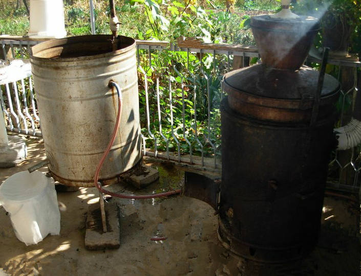 варење ракија во с. Бараково Демир Хисар